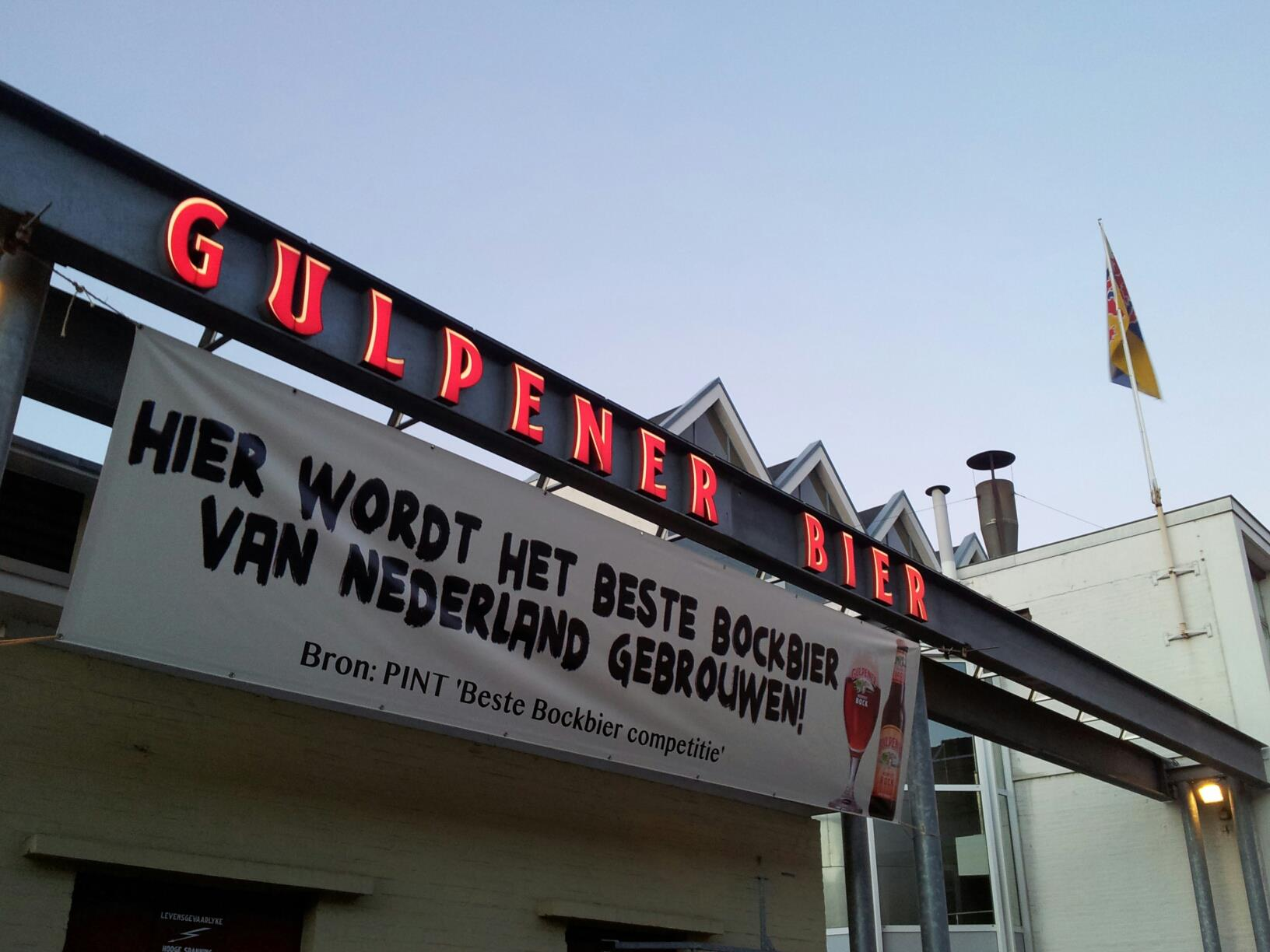 Spandoek bij de Gulpener Bierbrouwerij; Gulpener HerfstBock Beste Bock 2012